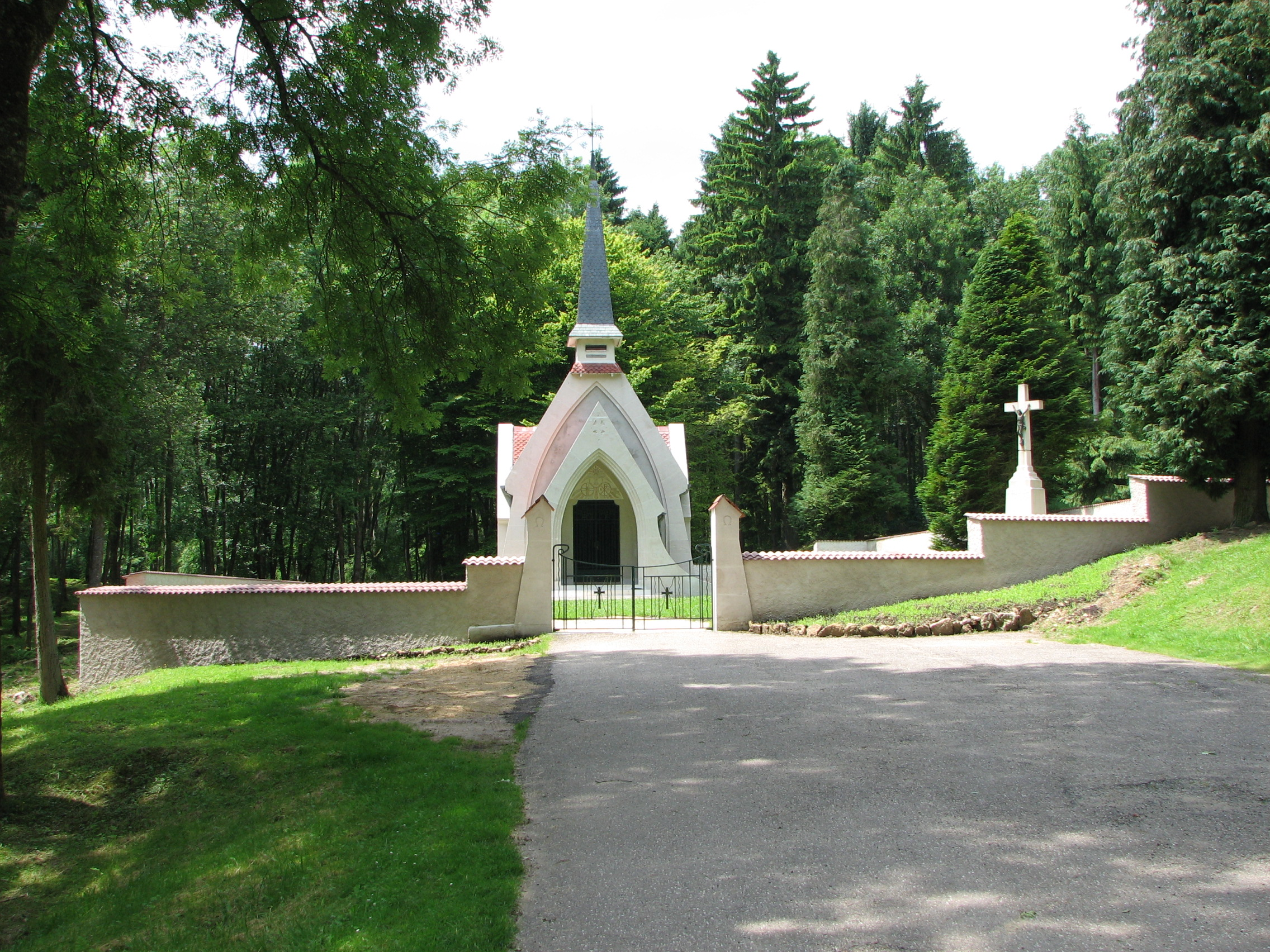 Eglise construite après la guerre à Bezonvaux, Village français détruit durant la Première Guerre mondiale.